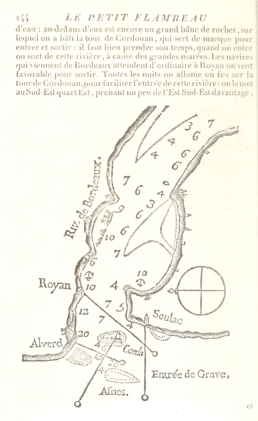 René Bougard, Le petit flambeau de la mer, 1817 : estuaire de la Gironde.